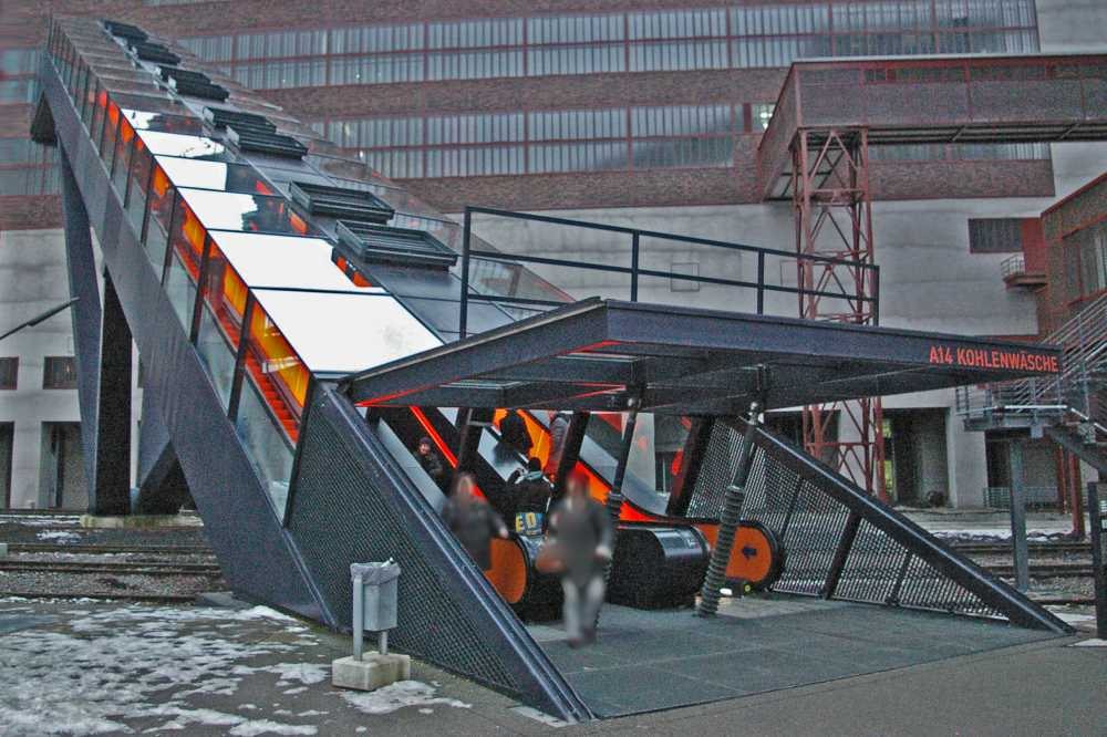 Außenwerbung auf der Zeche Zollverein für das Ruhr Museum